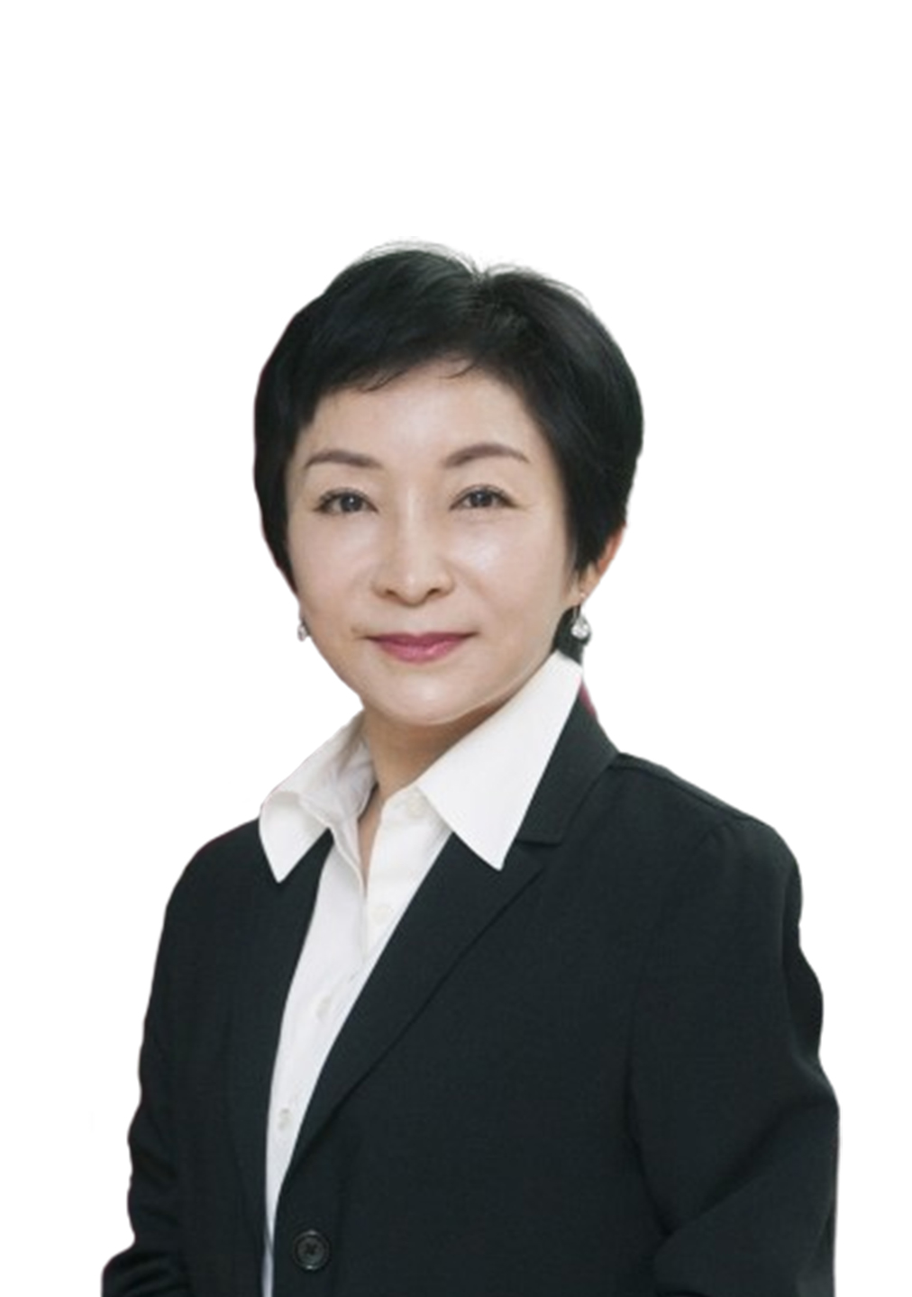 조기숙 교수